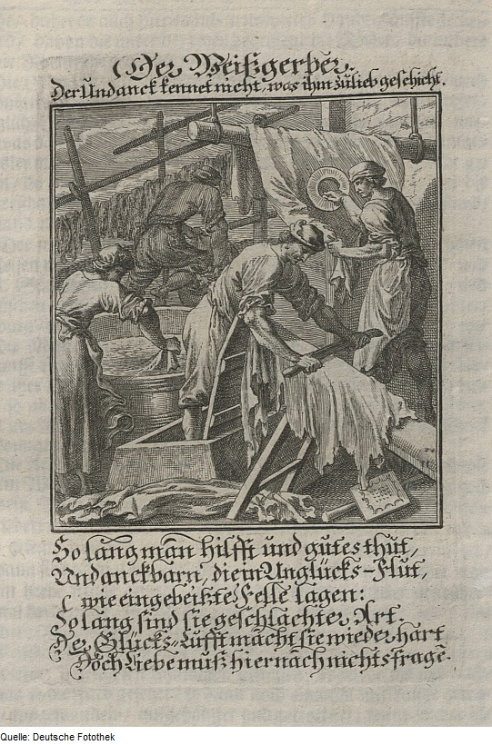 Original image description from the Deutsche Fotothek Ständebuch & Beruf & Handwerk & Gerber